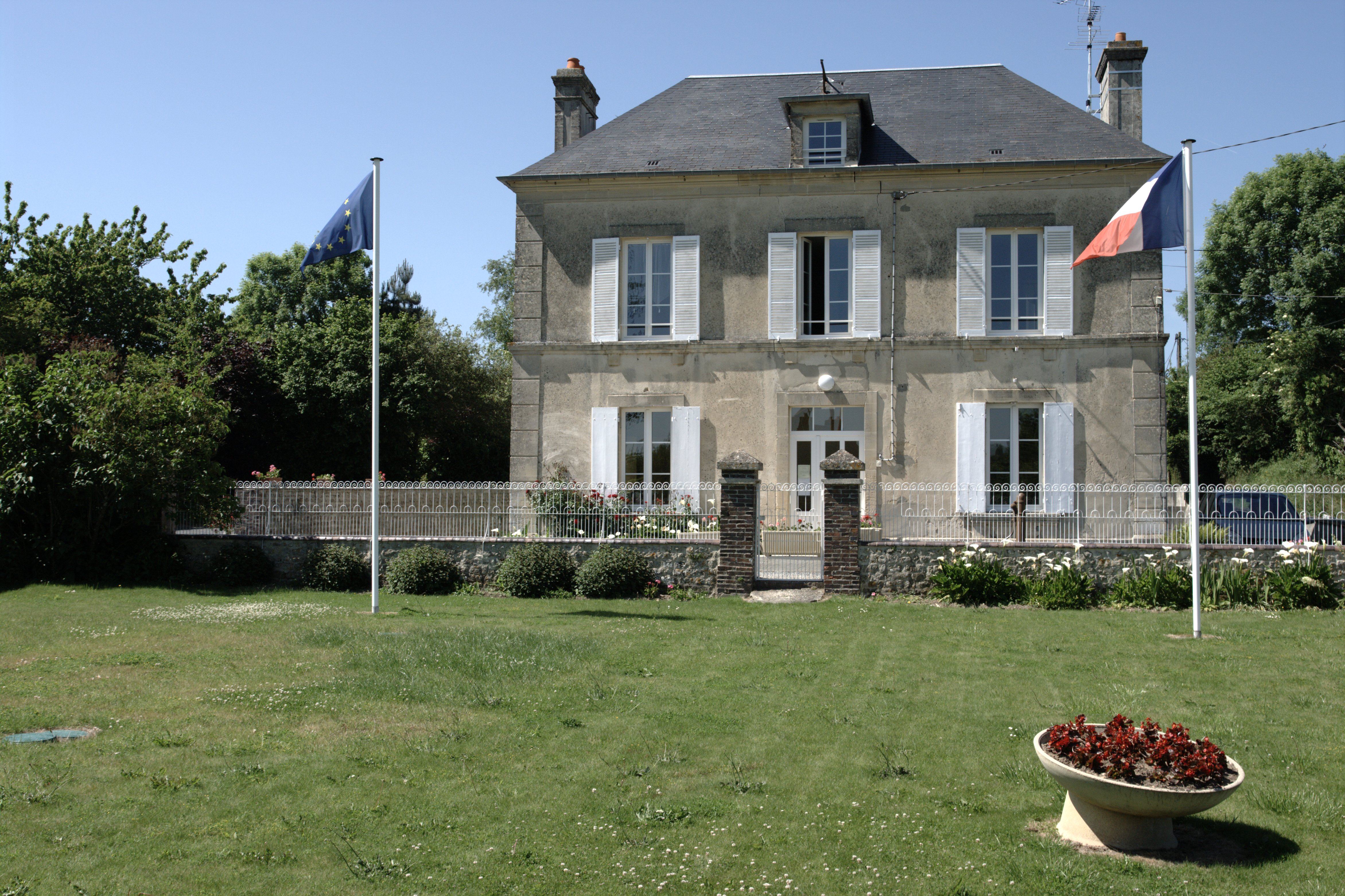 La Mairie de Aignerville, Calvados.